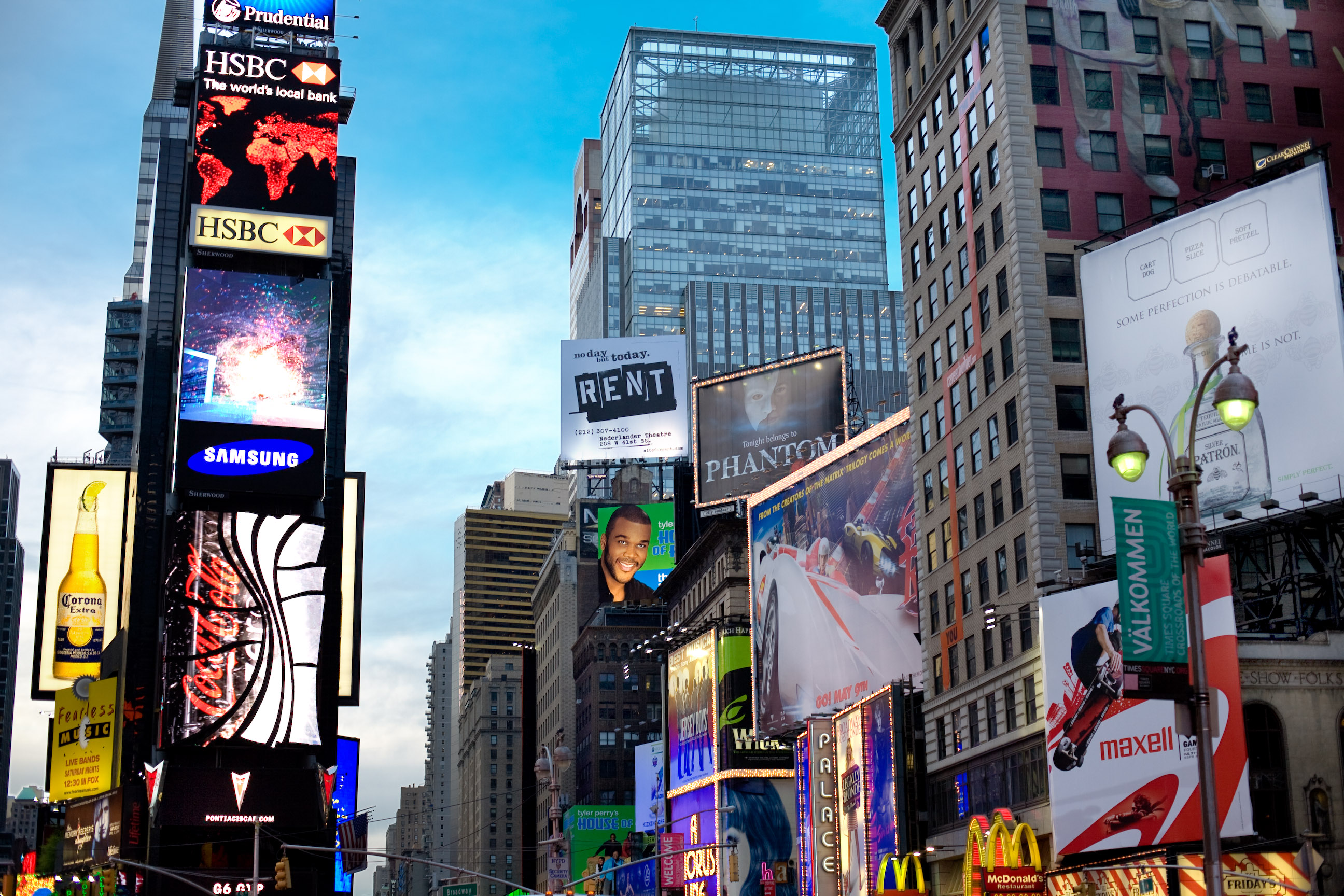 Signs, signs and more signs